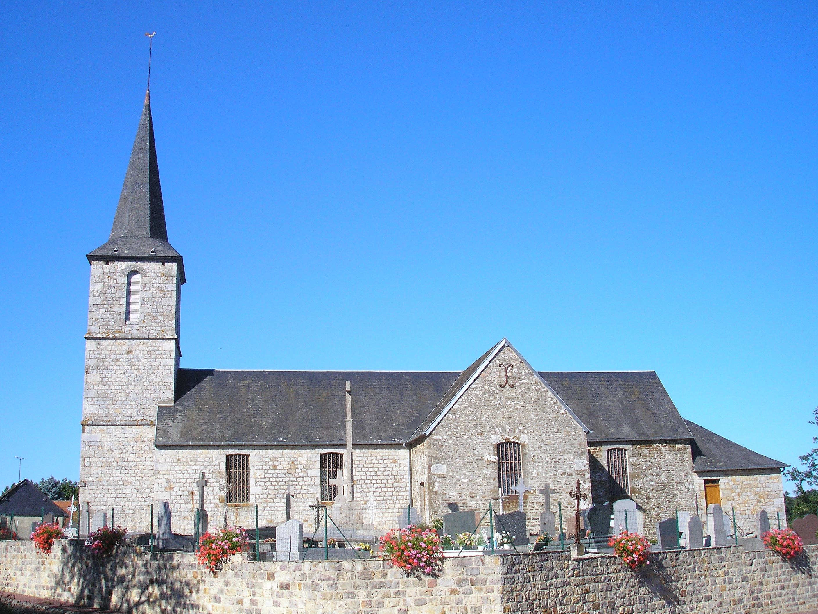 Saint-Brice (Normandie, France). L'église Saint-Brice.